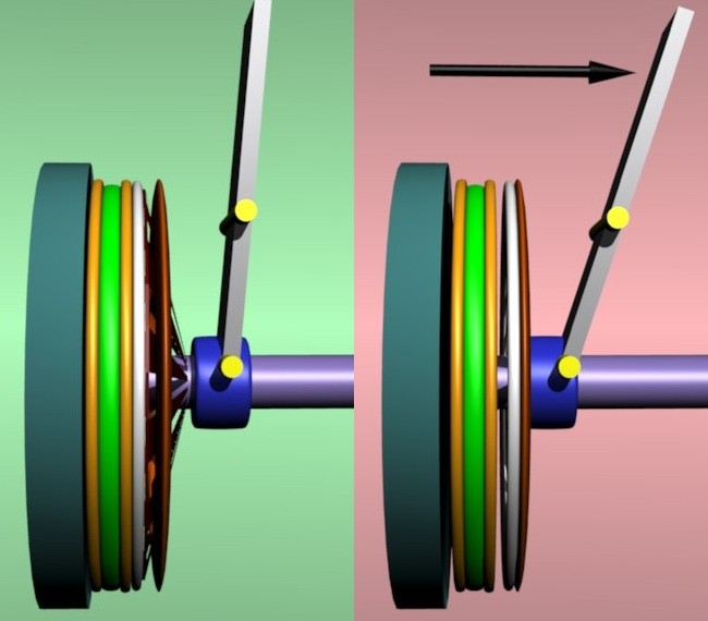 Arbeitsweise einer Einscheibenktrockenupplung 3D